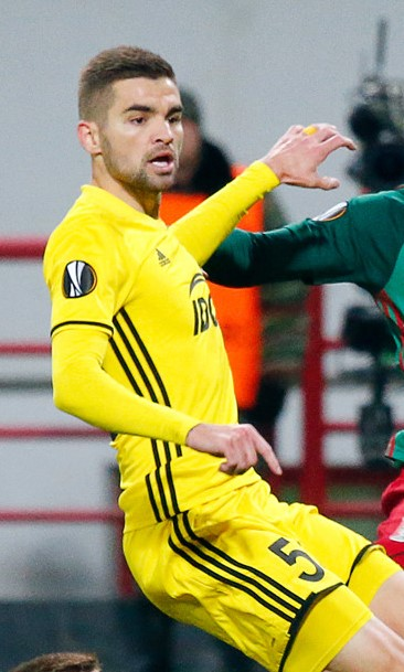 Mateo Sušić